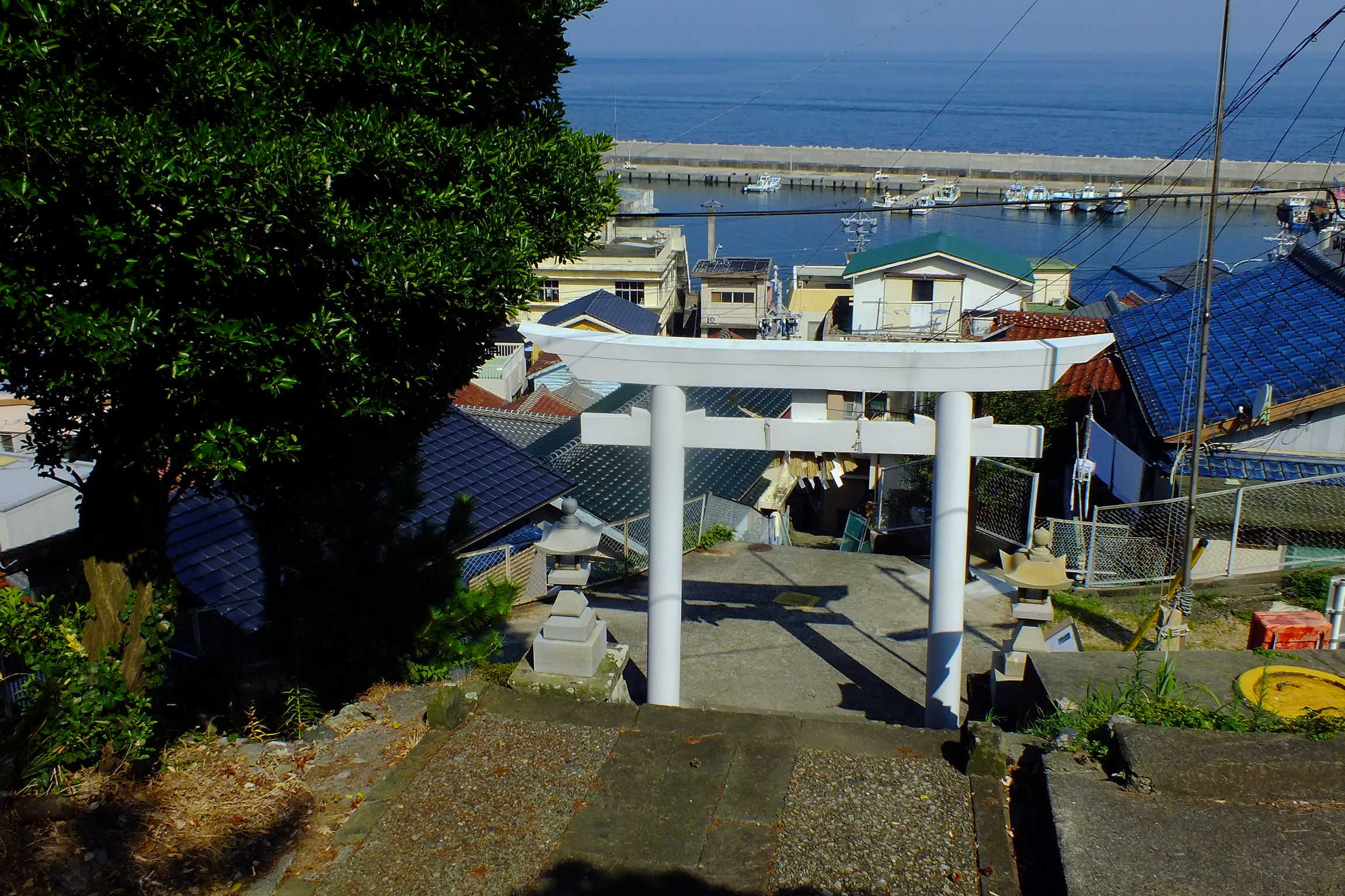 2016-08-05 Yashiro-Shrine in Kami Island (Mie) 神島民家・路地、八代神社 三島由紀夫が『潮騒』に描いた八代神社